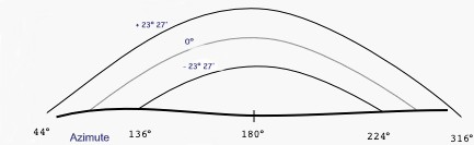 Variação azimutal do Sol em função da declinação (nos 56º N). Fote:Modificado da Wikipedia em inglês (Sun-declination.png).